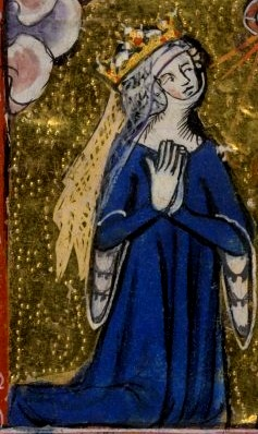 Eleonora Woodstočka